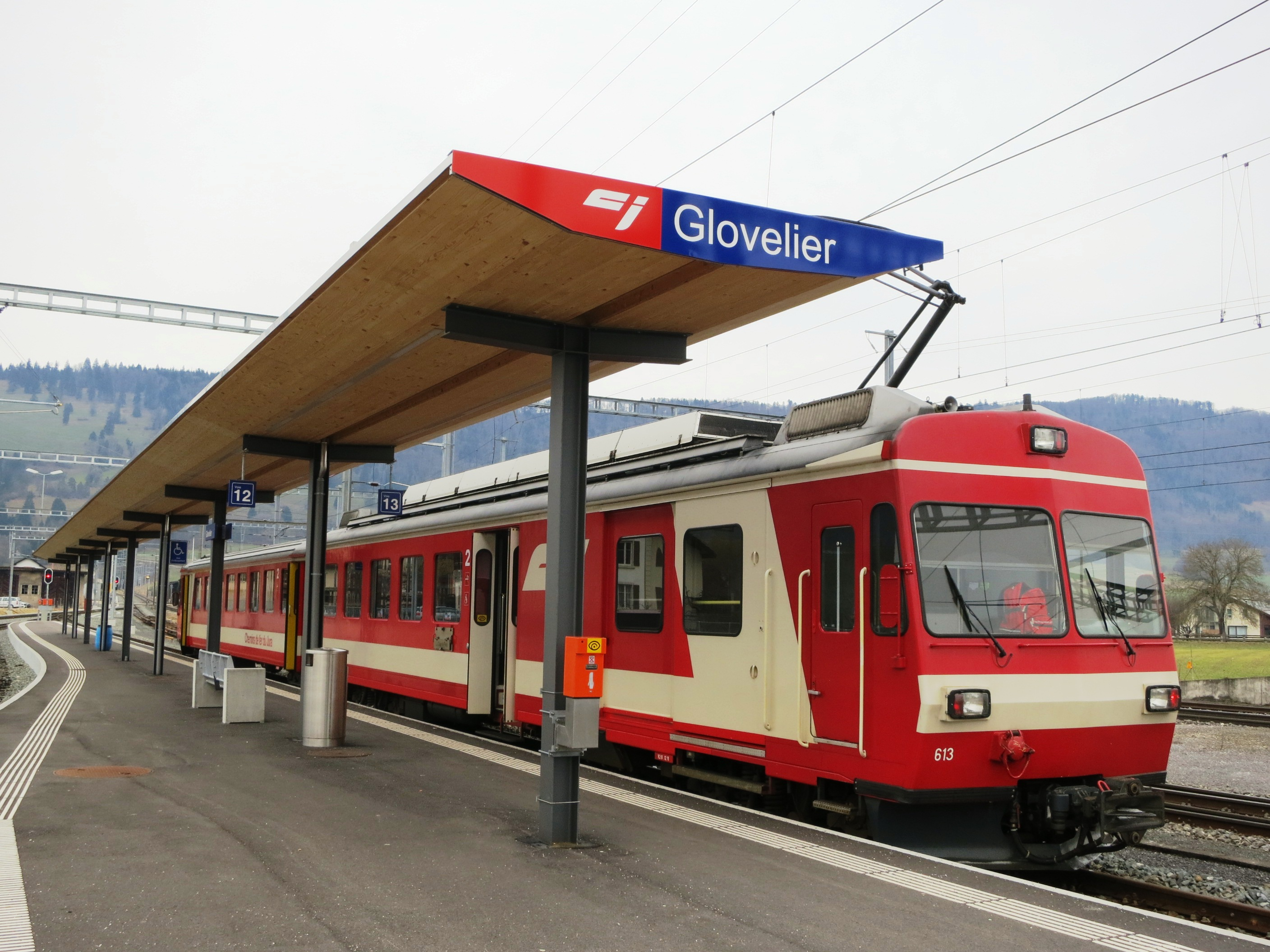 Bahnhof, Glovelier, Schweiz